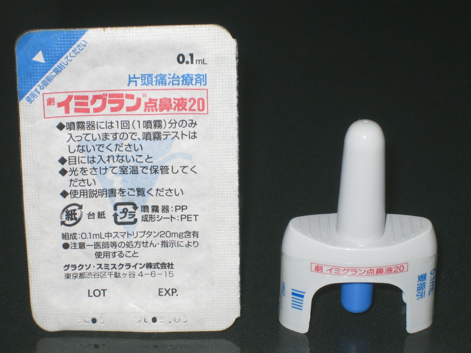 （劇）イミグラン点鼻液20 （偏頭痛・群発頭痛治療用スマトリプタン製剤） グラクソ・スミスクライン株式会社